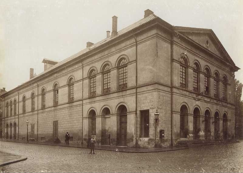 Christiania Theater, revet 12.10.1899. teater, mann, gutt, postkasse, gatebelysning.